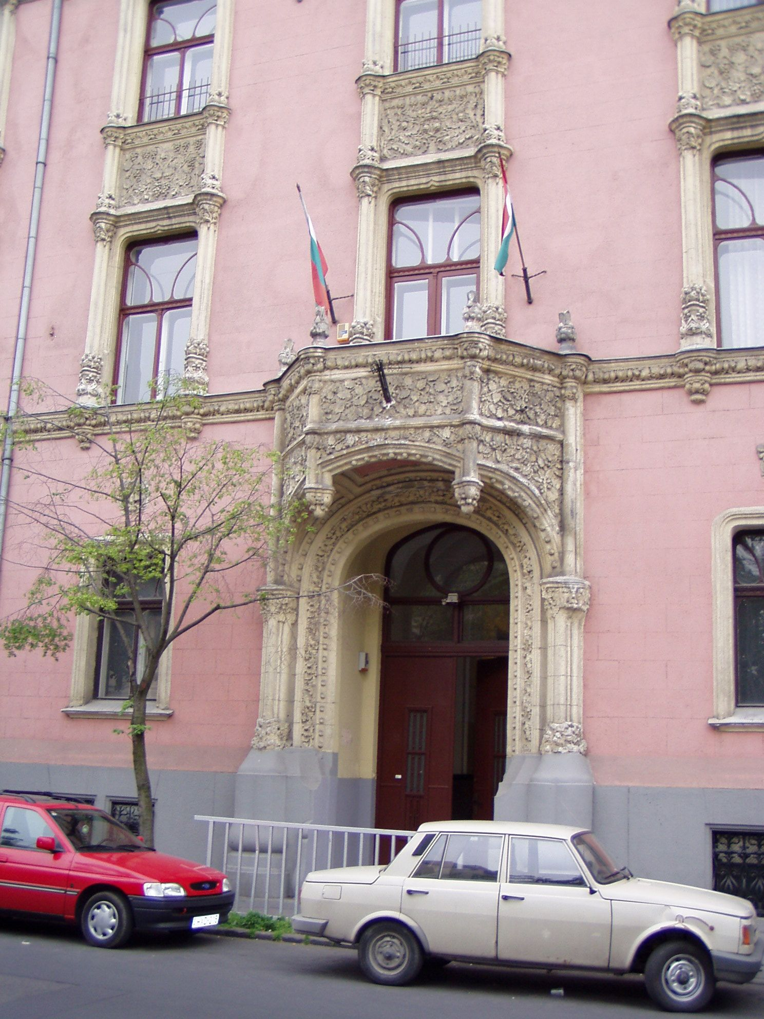 Hriszto Botev Bolgár-Magyar Általános Iskola és Gimnázium (Baruch house), Bajza u. 44, Budapest VI, Hungary